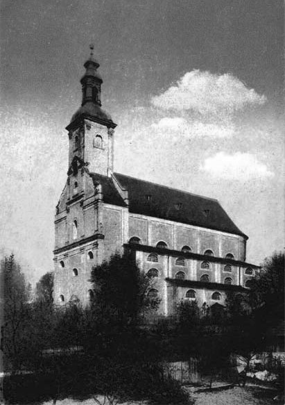 Ewangelicki Kościół Jezusowy w Cieszynie. Widokówka najpóżniej z 1907 roku, autor nie znany; na widokówce napisy: "Teschen a. d. Olsa" i "Evangelische Gnadenkirche".